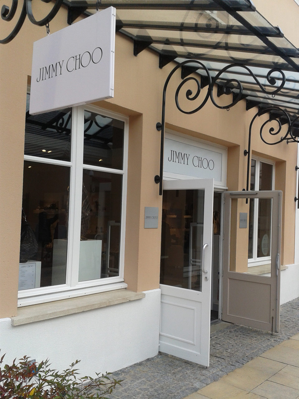 devanture du magasin outlet de l'enseigne Jimmy Choo, au centre commercial Val d'Europe, en France